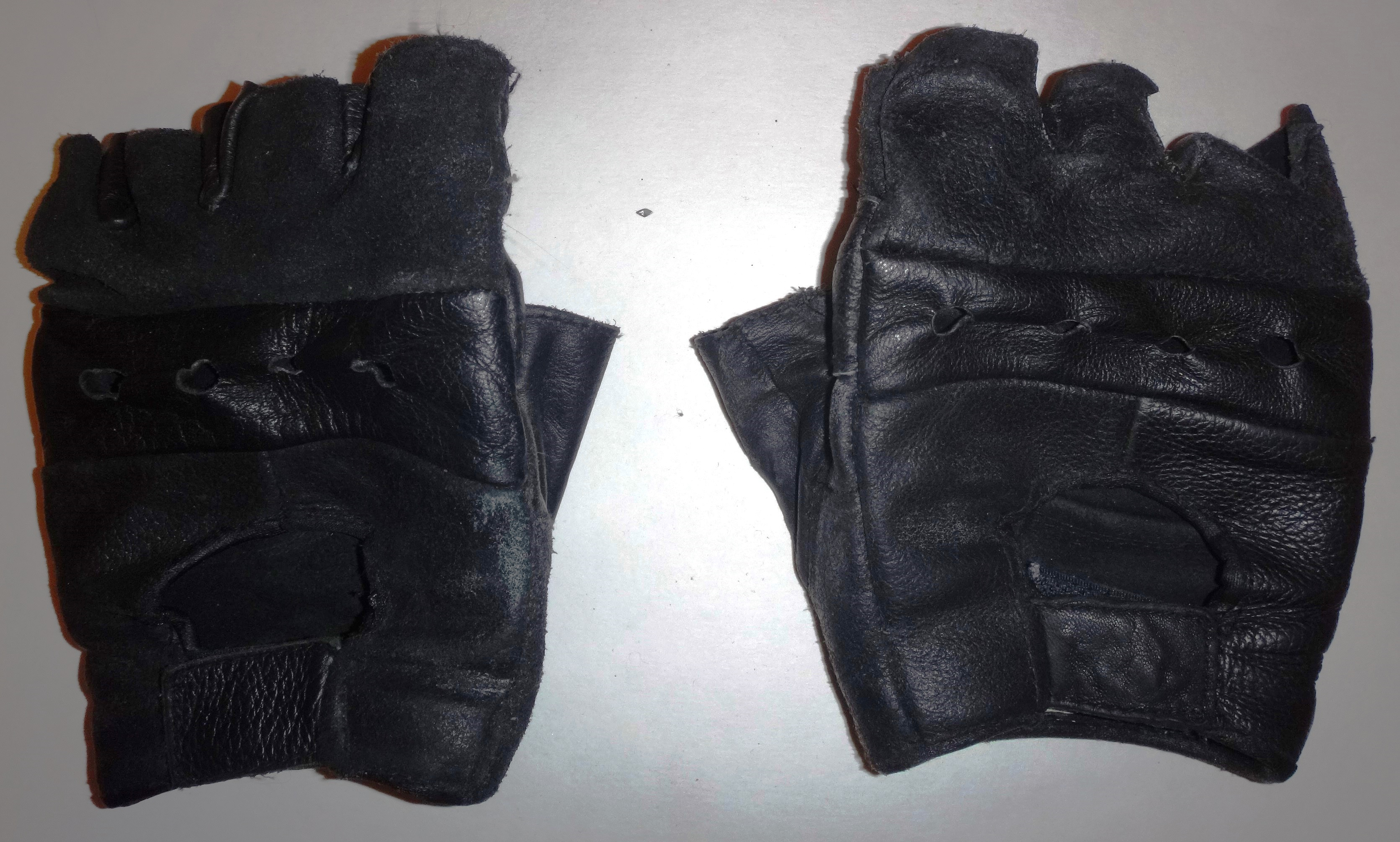 Перчатки без пальцев